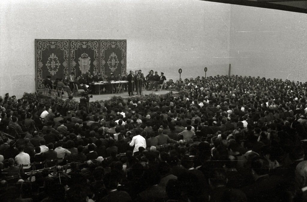 Título original: Campeonato de bertsolaris celebrado en el frontón Anoeta (14/17) Localización: San Sebastián (Guipúzcoa)